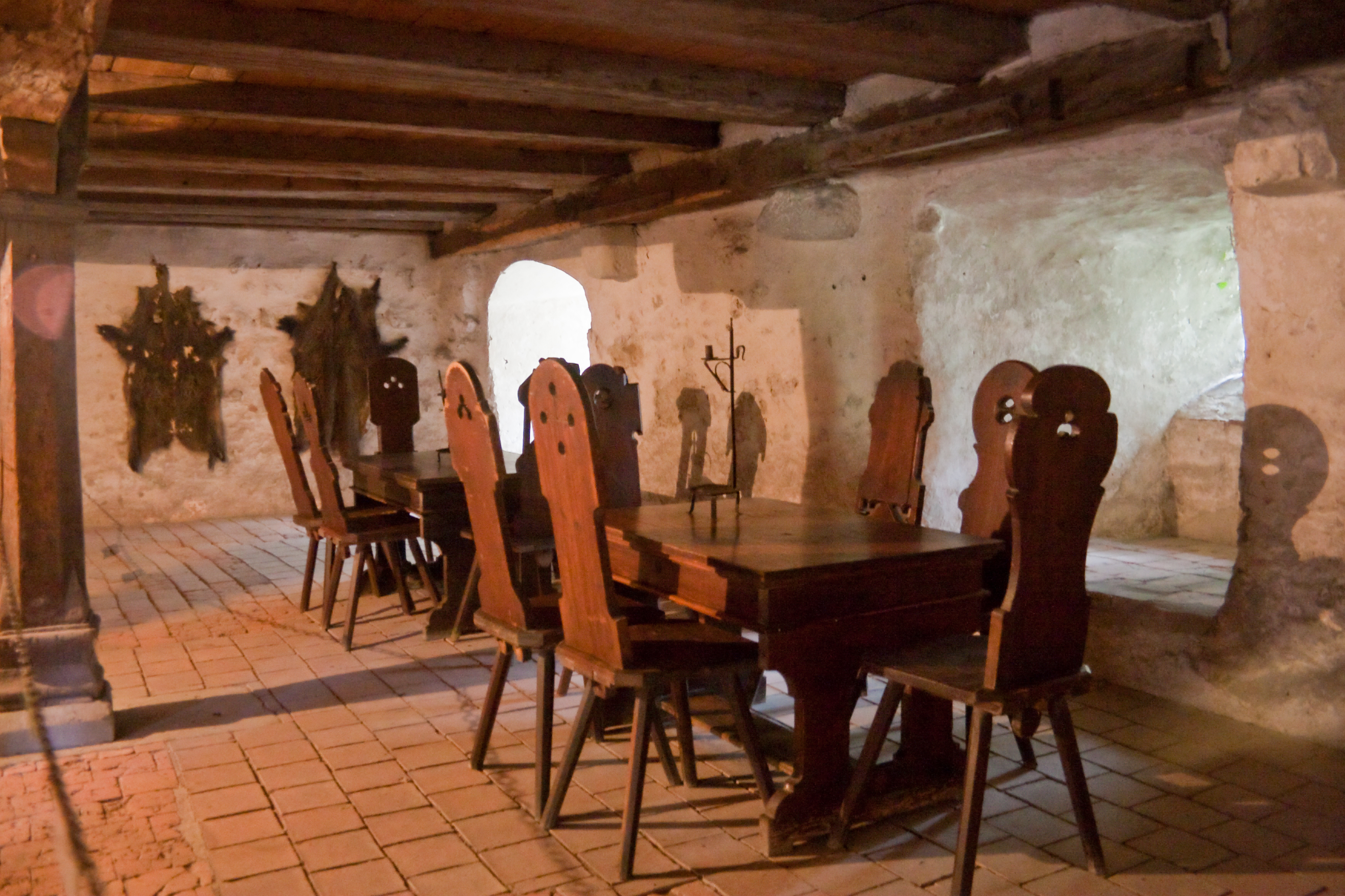 Burg Meersburg, Meersburg, Baden-Württemberg, Germany